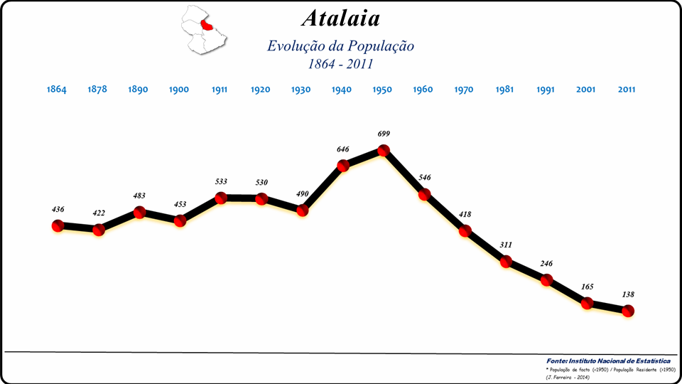 Evolução da População